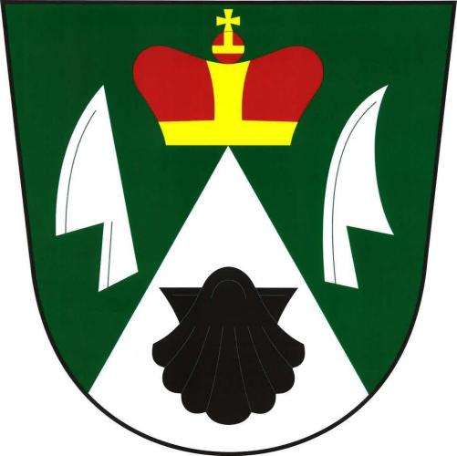 znak, Lutopecny, okres Kroměříž